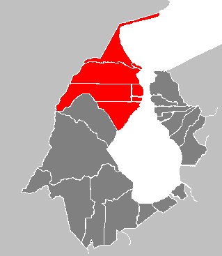 Cantón Maracaibo (1835 - 1904)